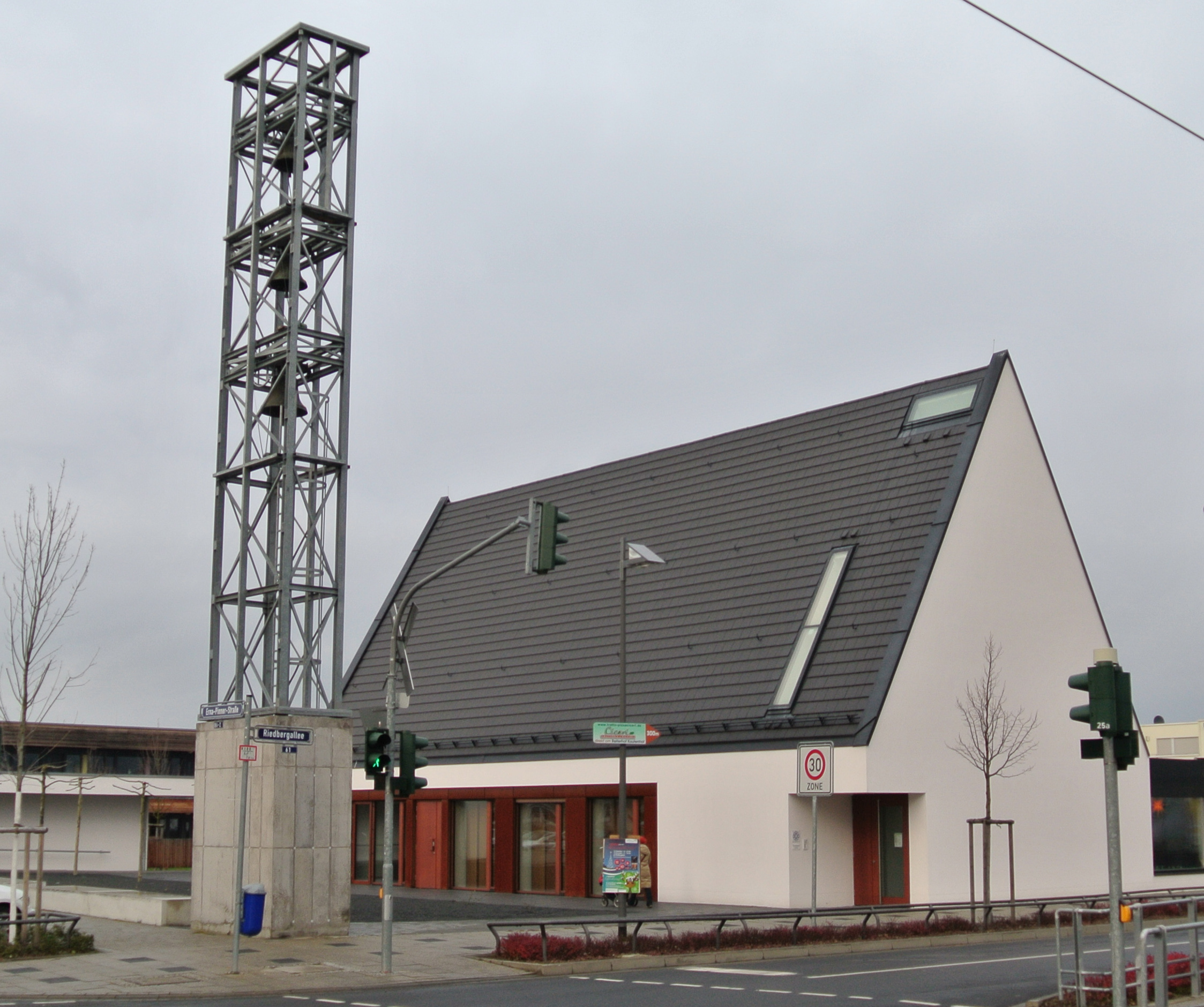 Evangelische Riedbergkirche in Frankfurt-Kalbach-Riedberg, Riedbergallee 61; Baujahr 2011; Architekt: Jurij Martinoff